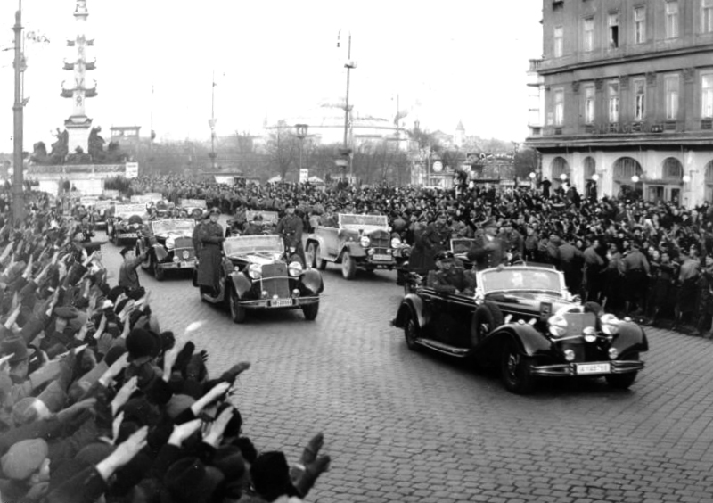 This description has been identified as biased or incorrect: Nazi-Propaganda ("geschichtliche Grosstat")Wiens Gruss an den Führer nach der geschichtlichen Grosstat. Als erste Stadt des Grossdeutschen Reiches war es der Hauptstadt der Ostmark, Wien, beschieden, den Führer in ihren Mauern nach seiner geschichtlichen Grosstat zu sehen und ihn in einem unbeschreiblichen Begrüssungsjubel des Dankes der Ostmark zu versichern. Unser Bild zeigt die Wagenkolonne des Führers bei der Einfahrt in die Wiener Innenstadt. Im Hintergrund links das Tegetthoff-Denkmal Information added by Wikimedia users.